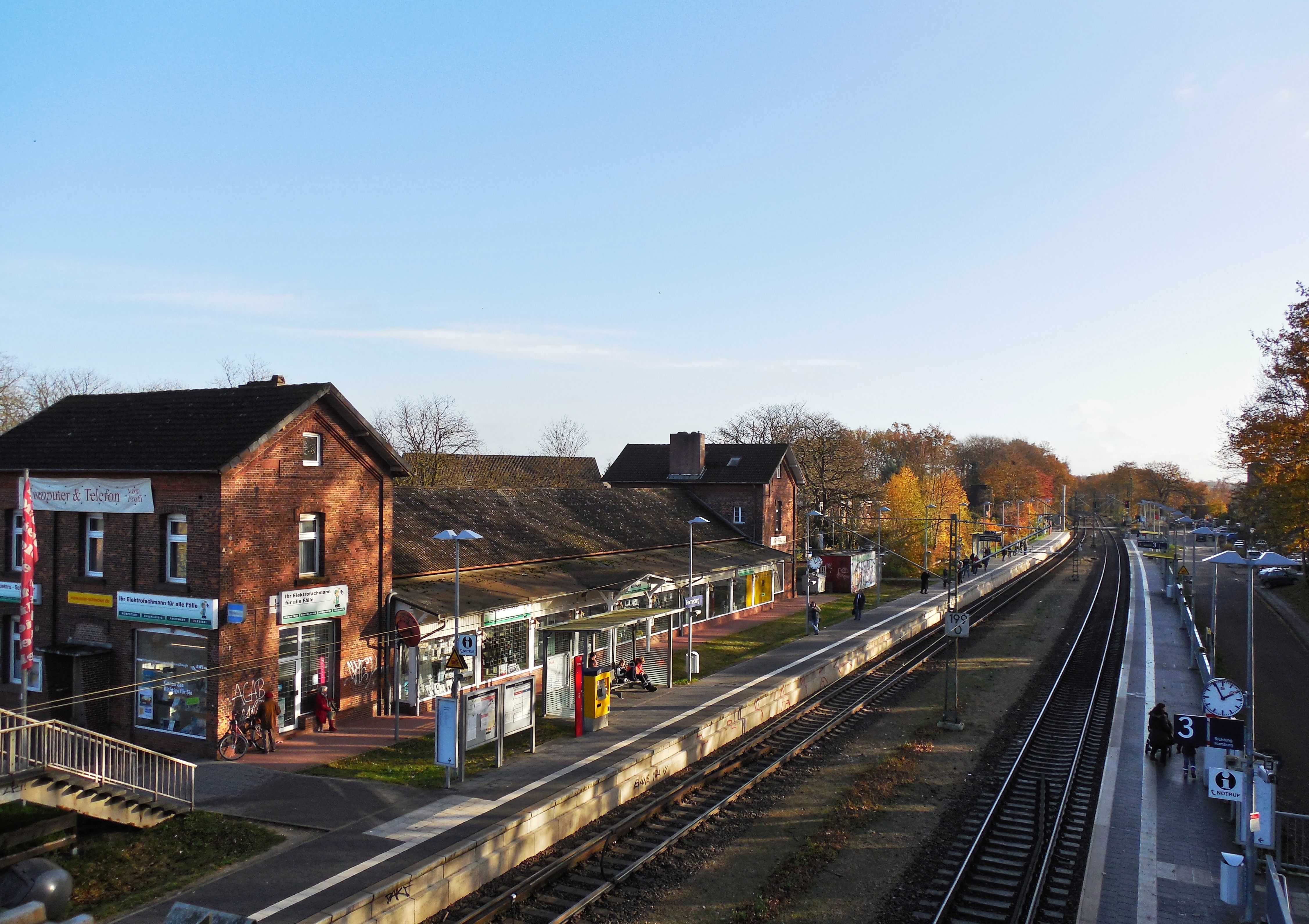 Bahnhof Horneburg